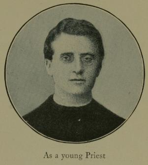 Il futuro papa Pio XI come giovane sacerdote.